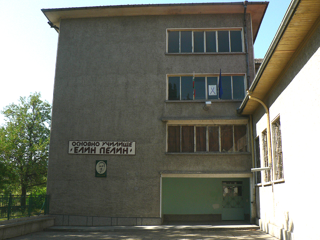 Основно Училище "Елин Пелин" с. Първомайци